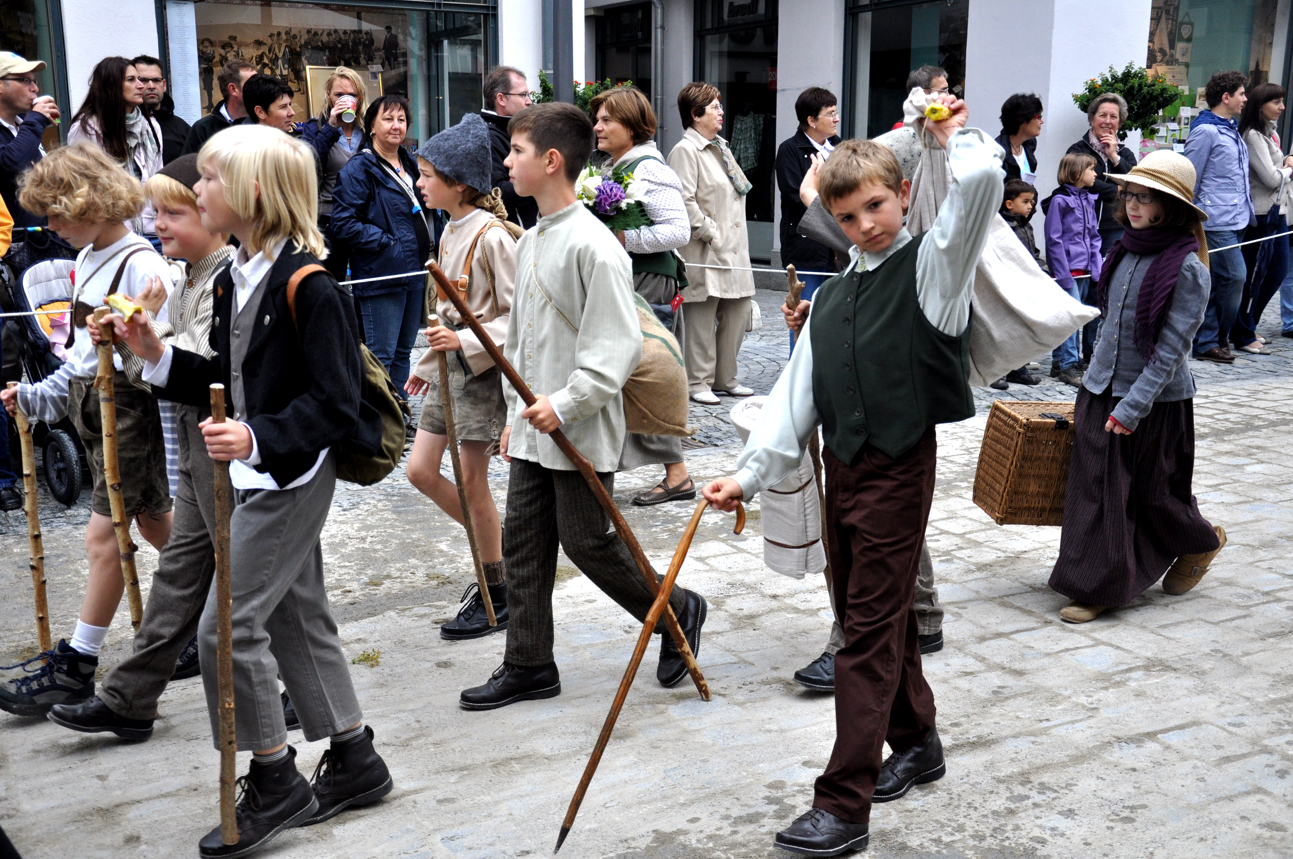 Rutenfest Ravensburg 2011, Festzug am Rutenmontag "Tiroler Schwabengänger"